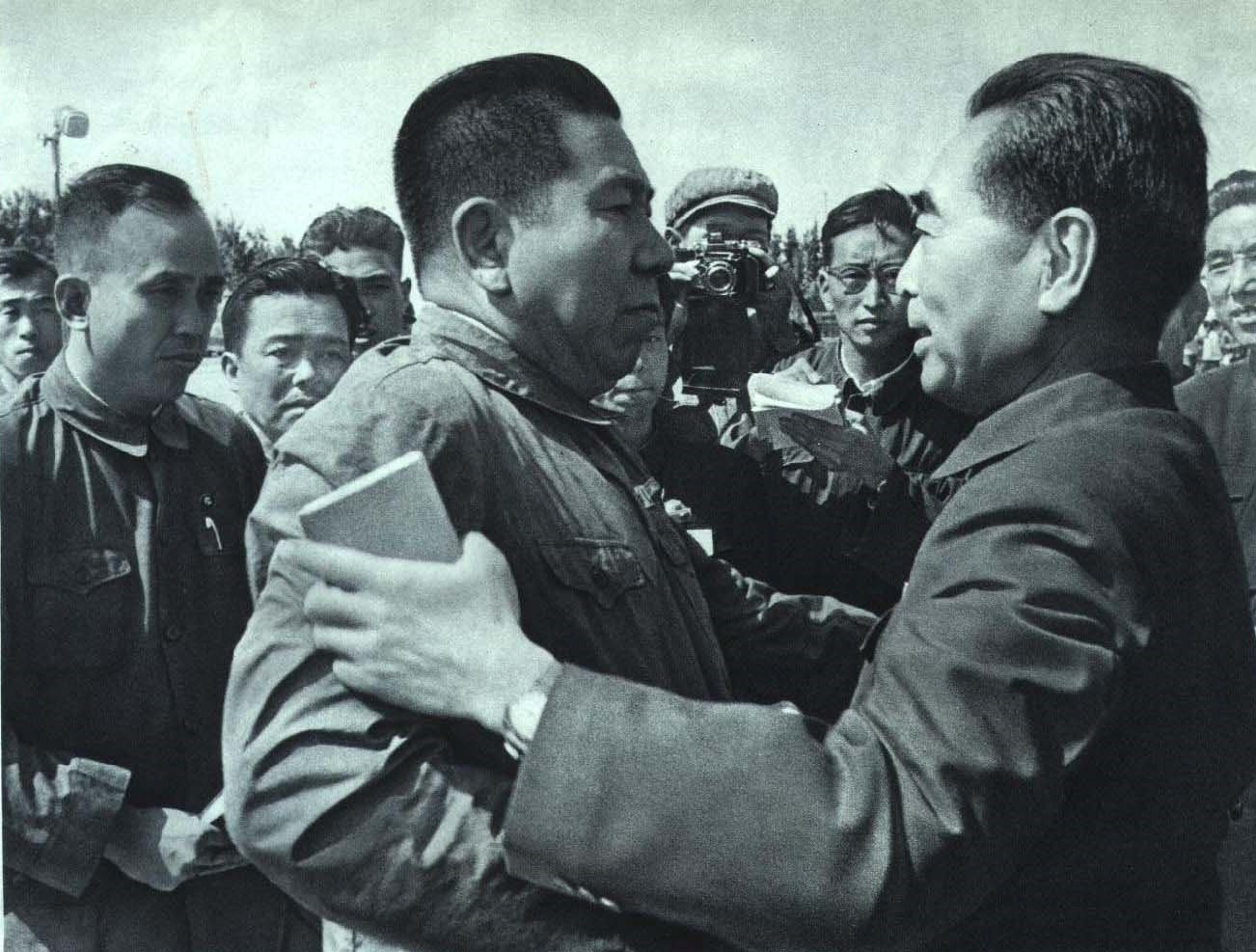 1967-07 1967年 中国驻印尼代办姚登山回国与周恩来